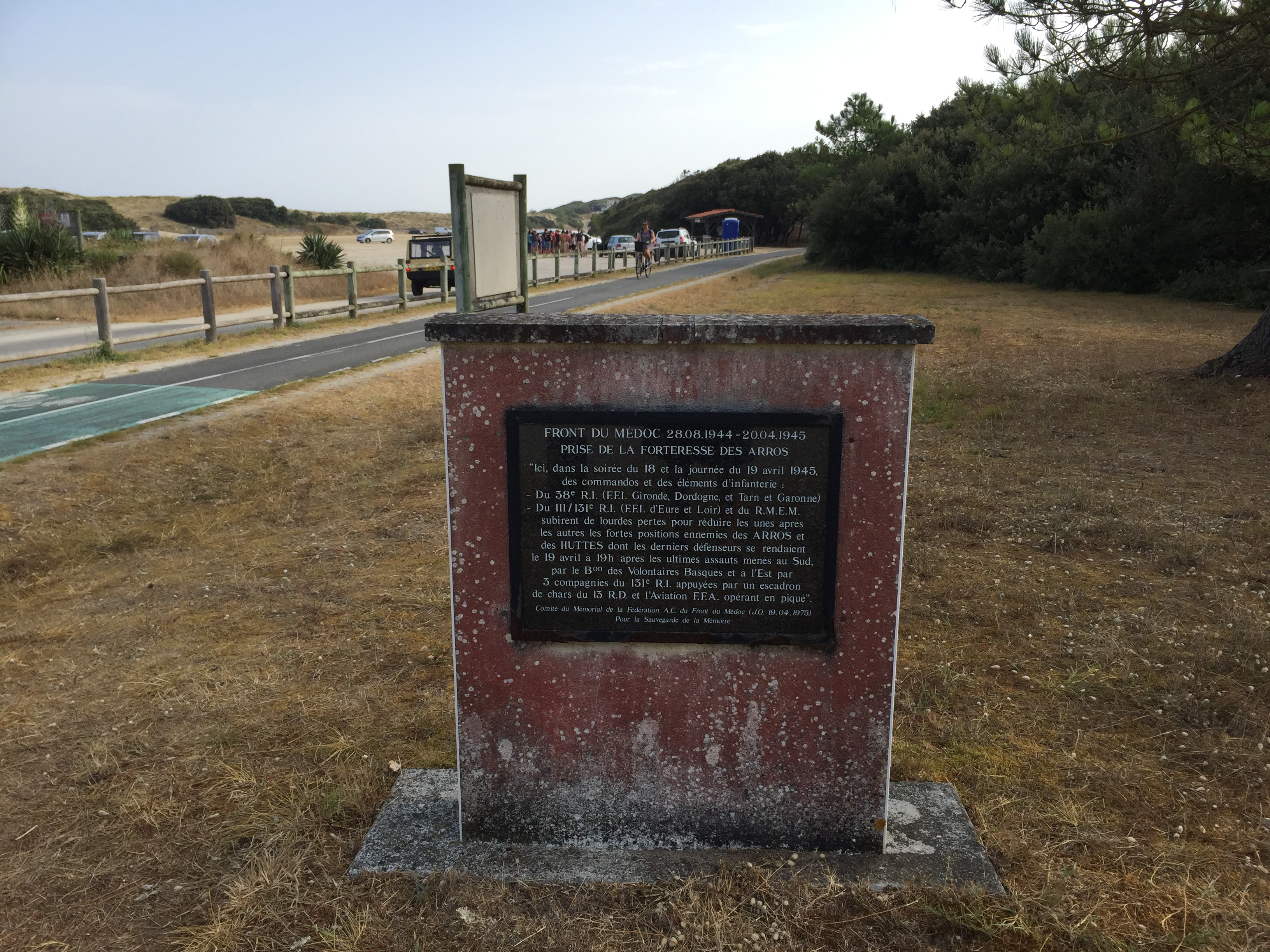 Les positions allemandes des Arros et des Huttes sont reprises par des commandos et des éléments d'infanterie de Gironde, de Dordogne, du Tarn-et-Garonne et d'Eure-et-Loir